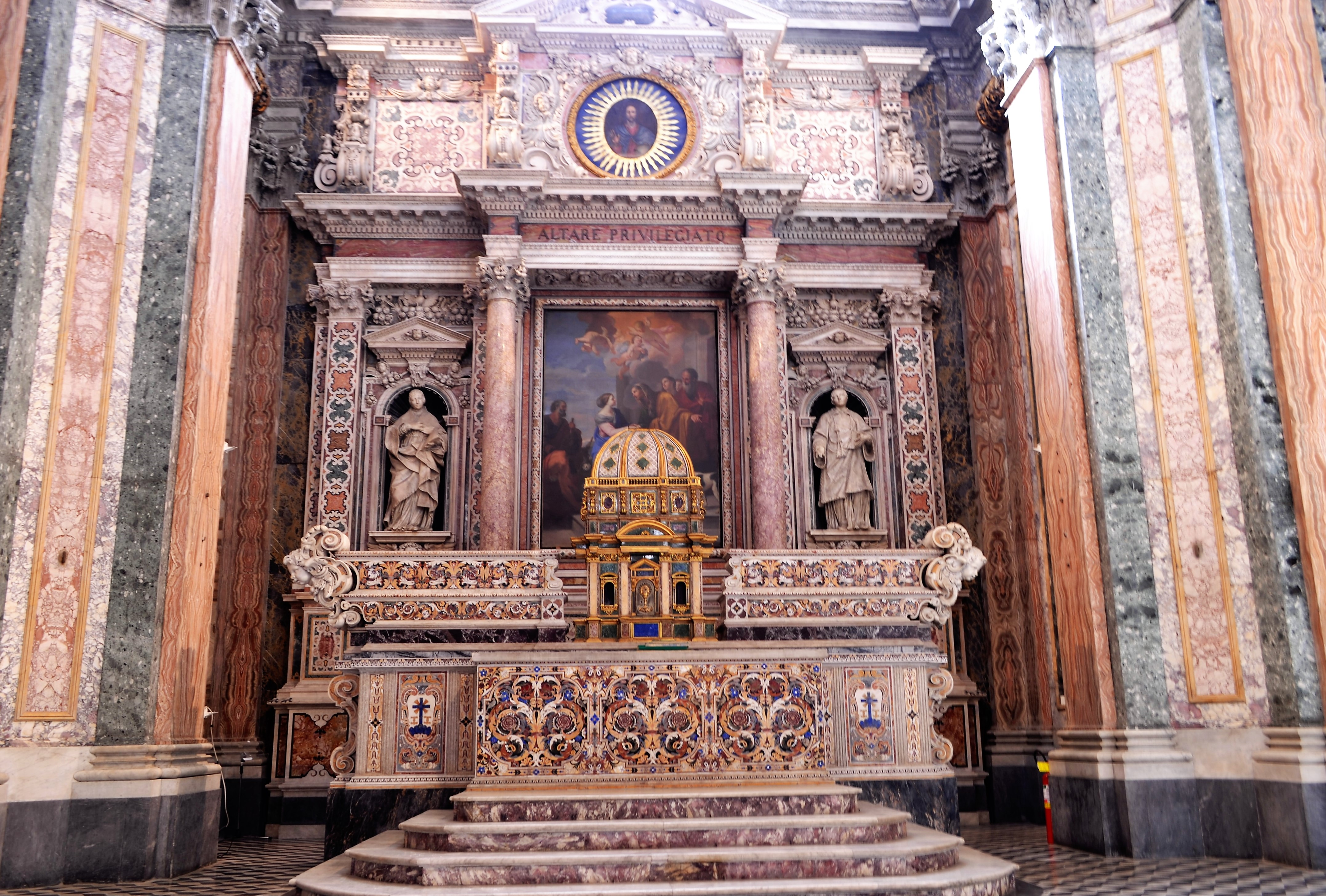 Chiesa dei Santi Marcellino e Festo di Napoli - Altare maggiore